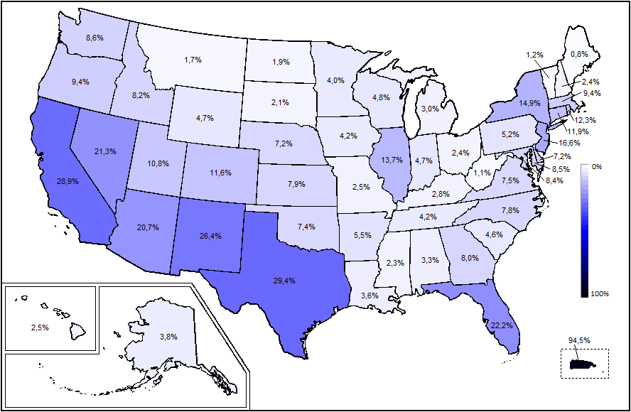 Mapa del porcentaje de la población de Estados Unidos de 5 o más años que habla español en casa en 2018, por Estados.